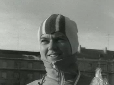 Het wereldkampioenschap schaatsen voor dames in Helsinki: Stien Kaiser. Statkevitsj wordt eerste in het algemeen eindklassement, Kaiser tweede en Titova derde.